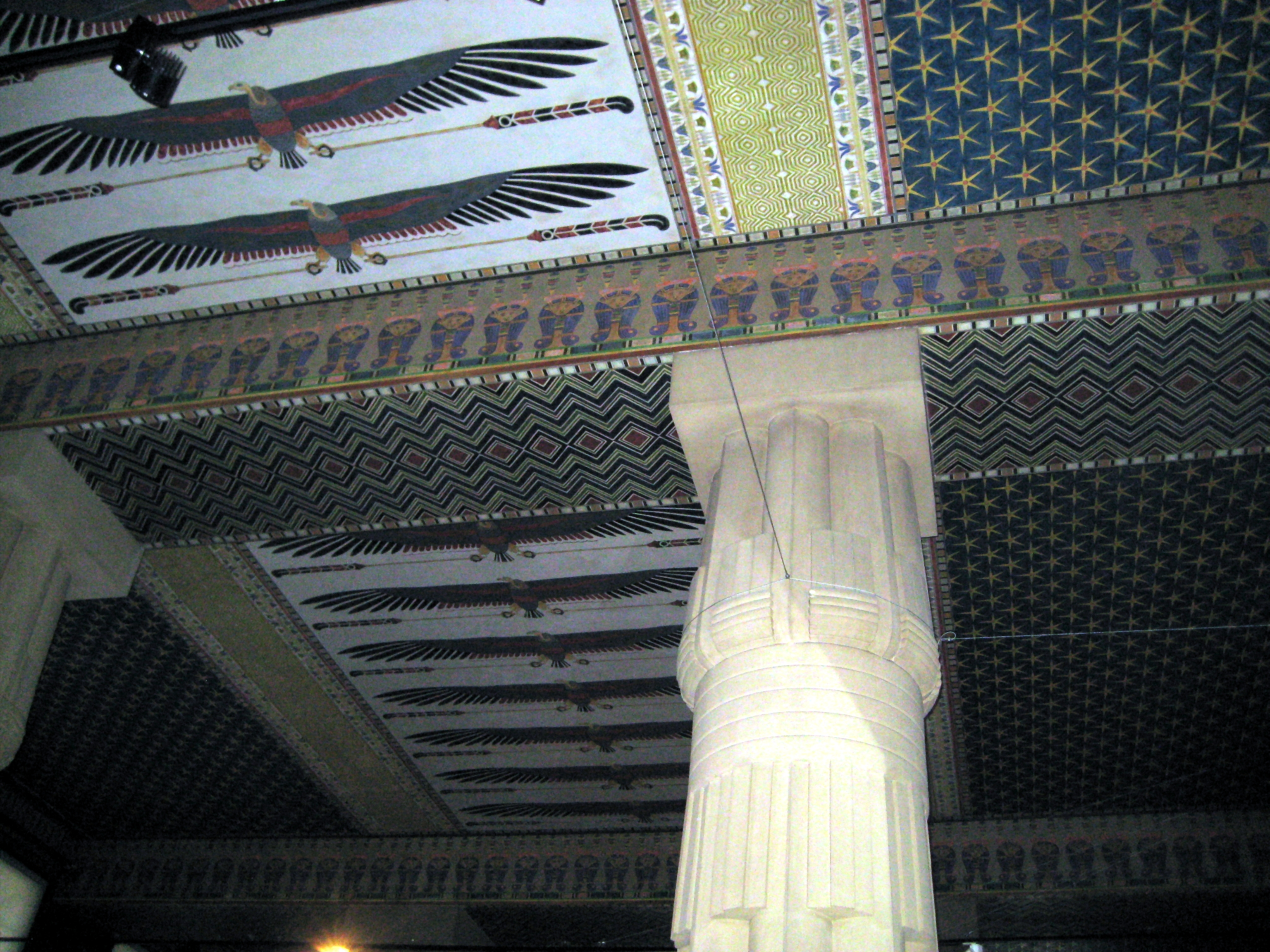 Египетский зал Пушкинского музея